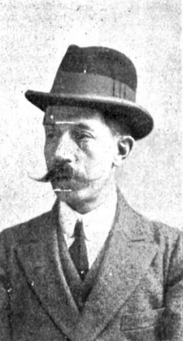 Fotografía del escritor español Antonio Palomero Dechado, director del diario La Noche, publicada en 1911.